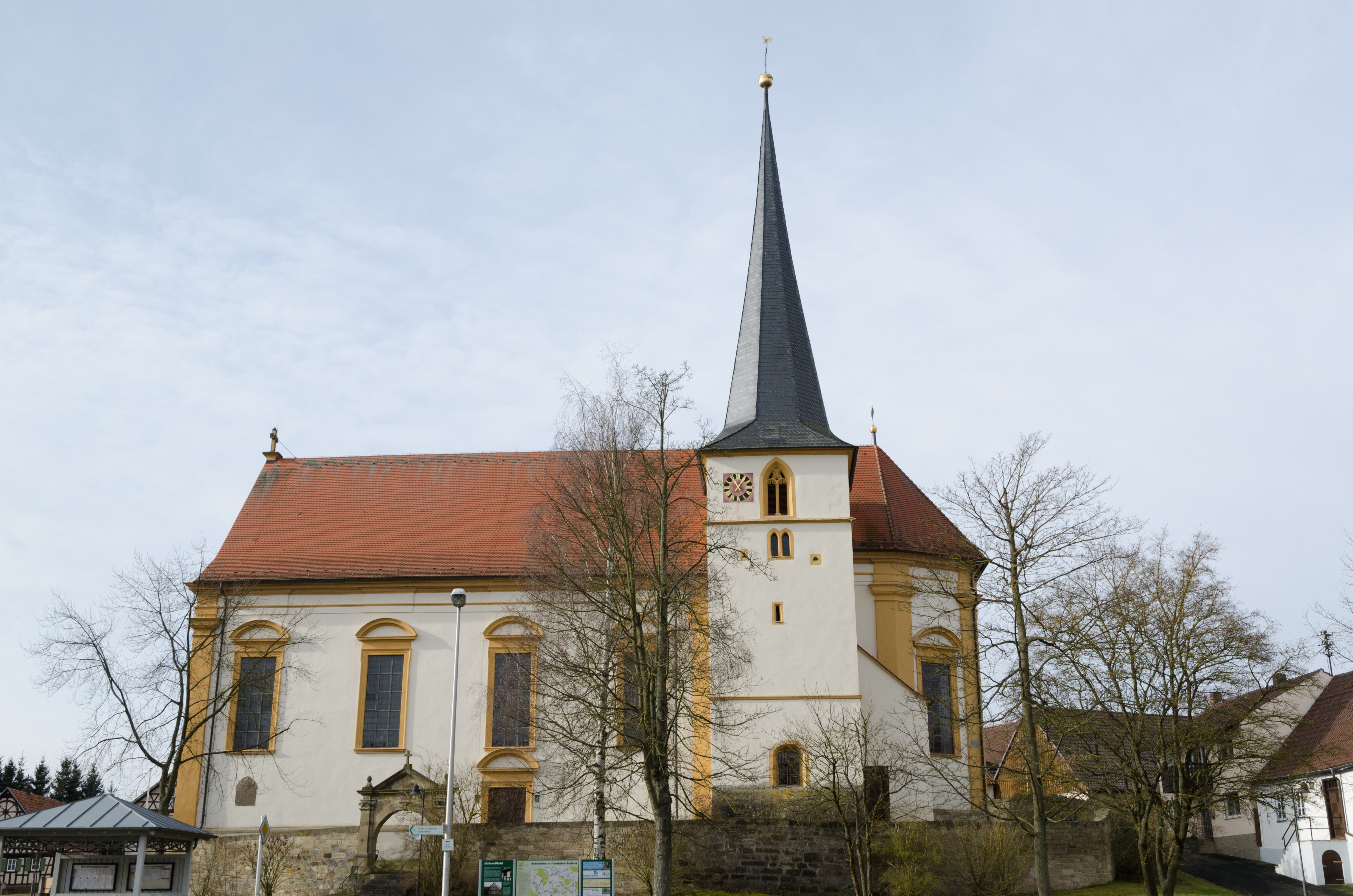 Bad Königshofen im Grabfeld, Untereßfeld, St. Johann Baptist und St. Aquilin